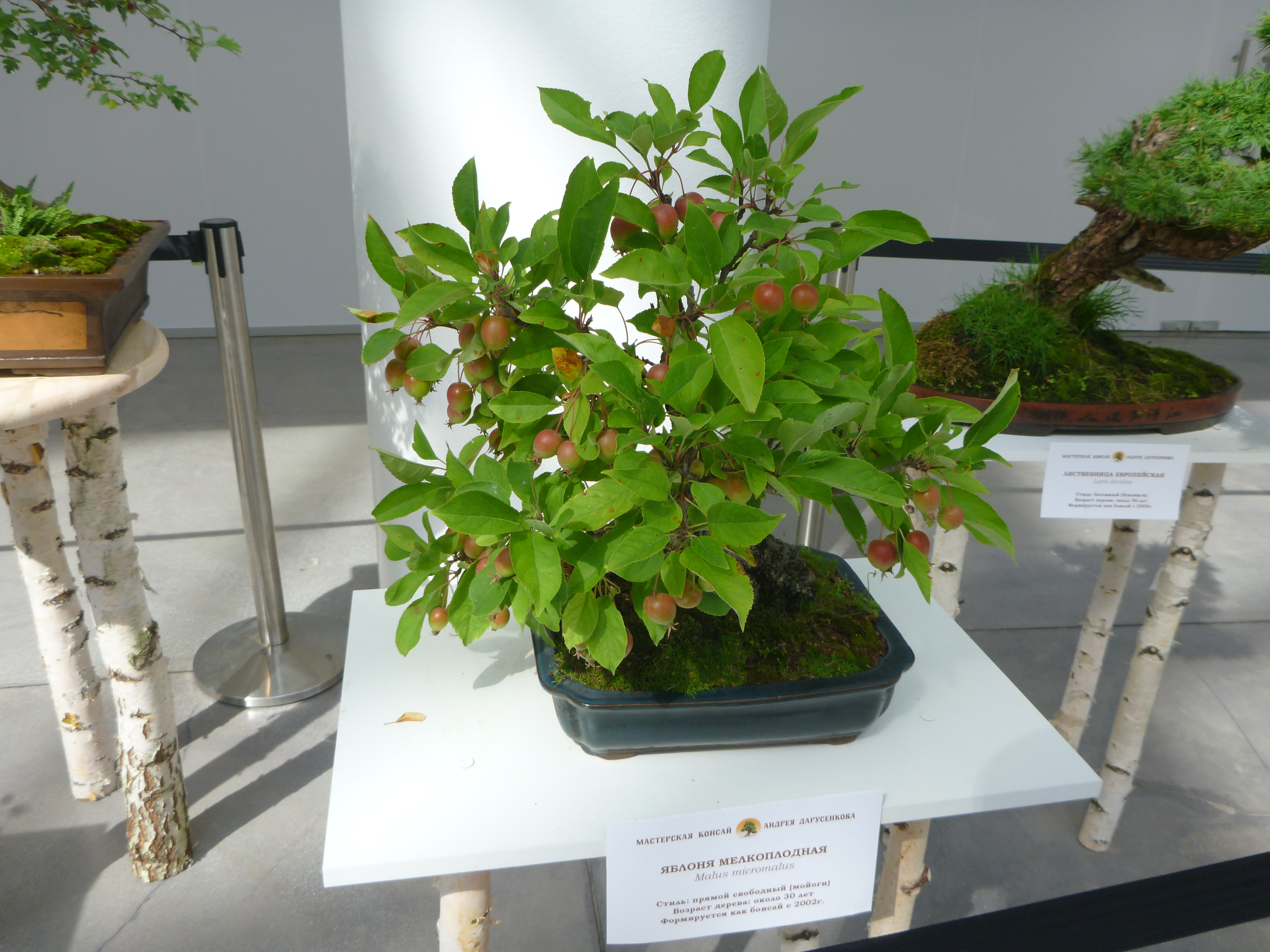 Яблоня мелкоплодная в форме бонсай в Ельцин-центре 2019 год